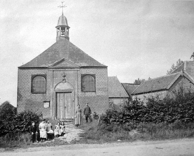 De Nederlands Hervomde kerk te Hapert